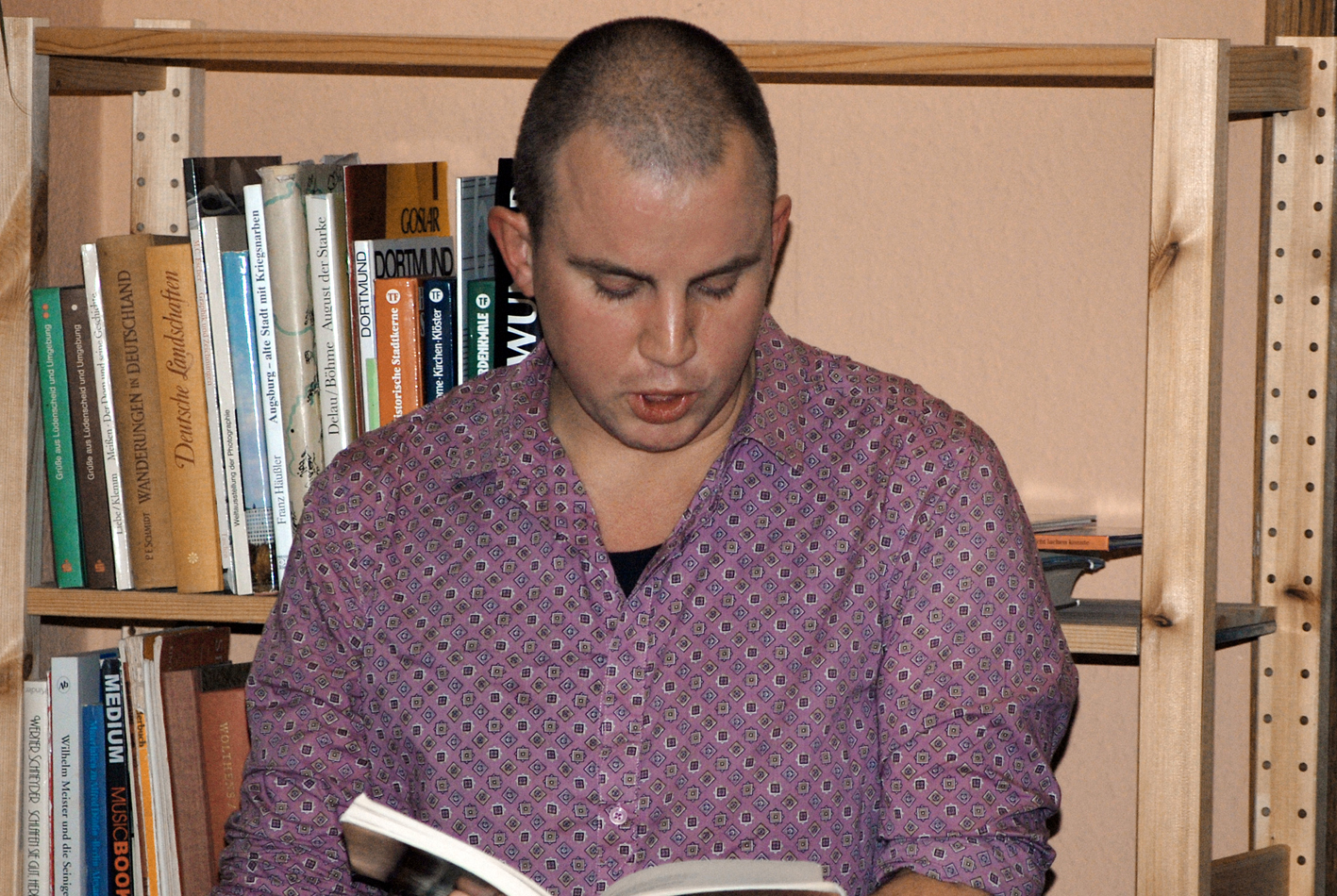 Lesung beim LesArt.Festival im Taranta Babu in Dortmund am 11. November 2010, Foto von Hartmut Salmen